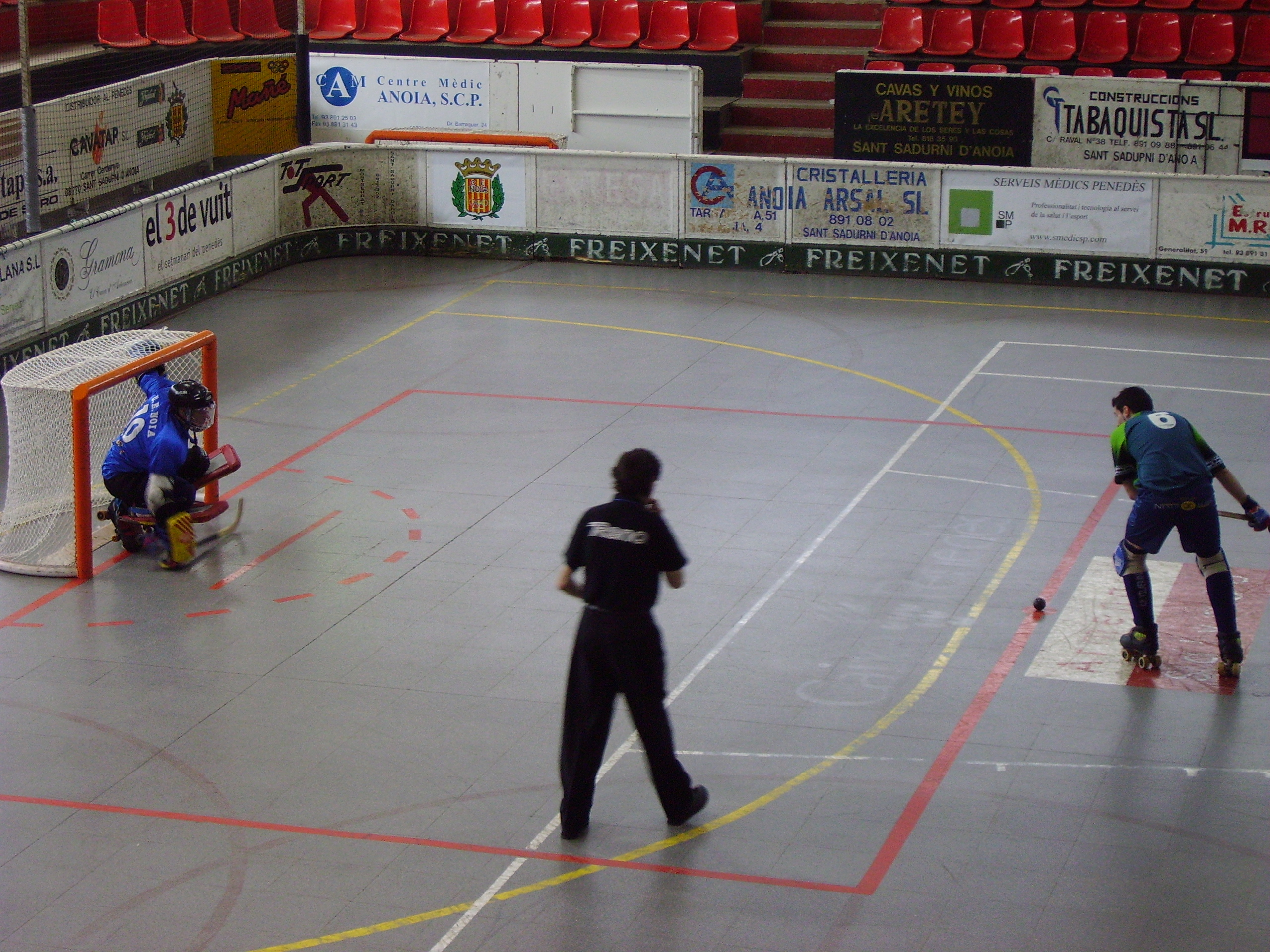 Llançament d'un penal. Pista del CE Noia, Sant sadurní d'Anoia.